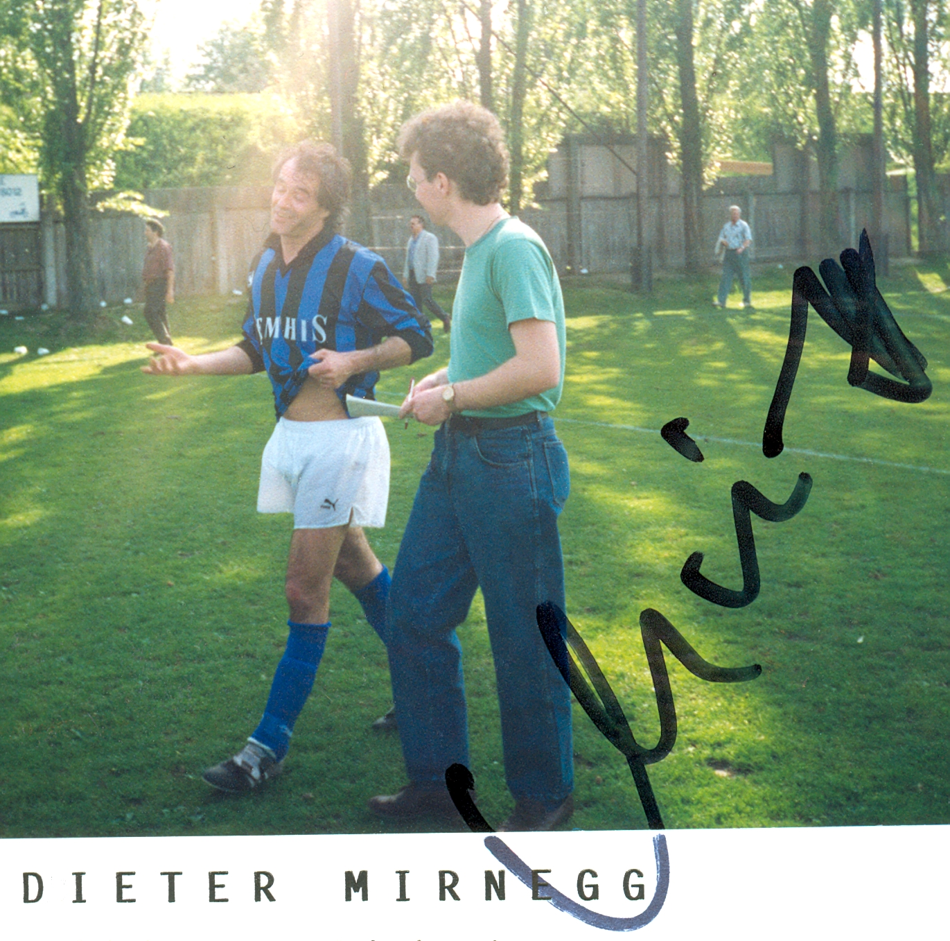 Bild mit Autogramm: Hans-Dieter Mirnegg nach dem Spiel im ÖFB-Cup-Achtelfinale SV Austria Tabak (Linz) vs WSG Swarovski Wattens am 1. 5. 1993, Endstand 0:4 vor 250 Zuschauern am Linzer Tabak-Sportplatz